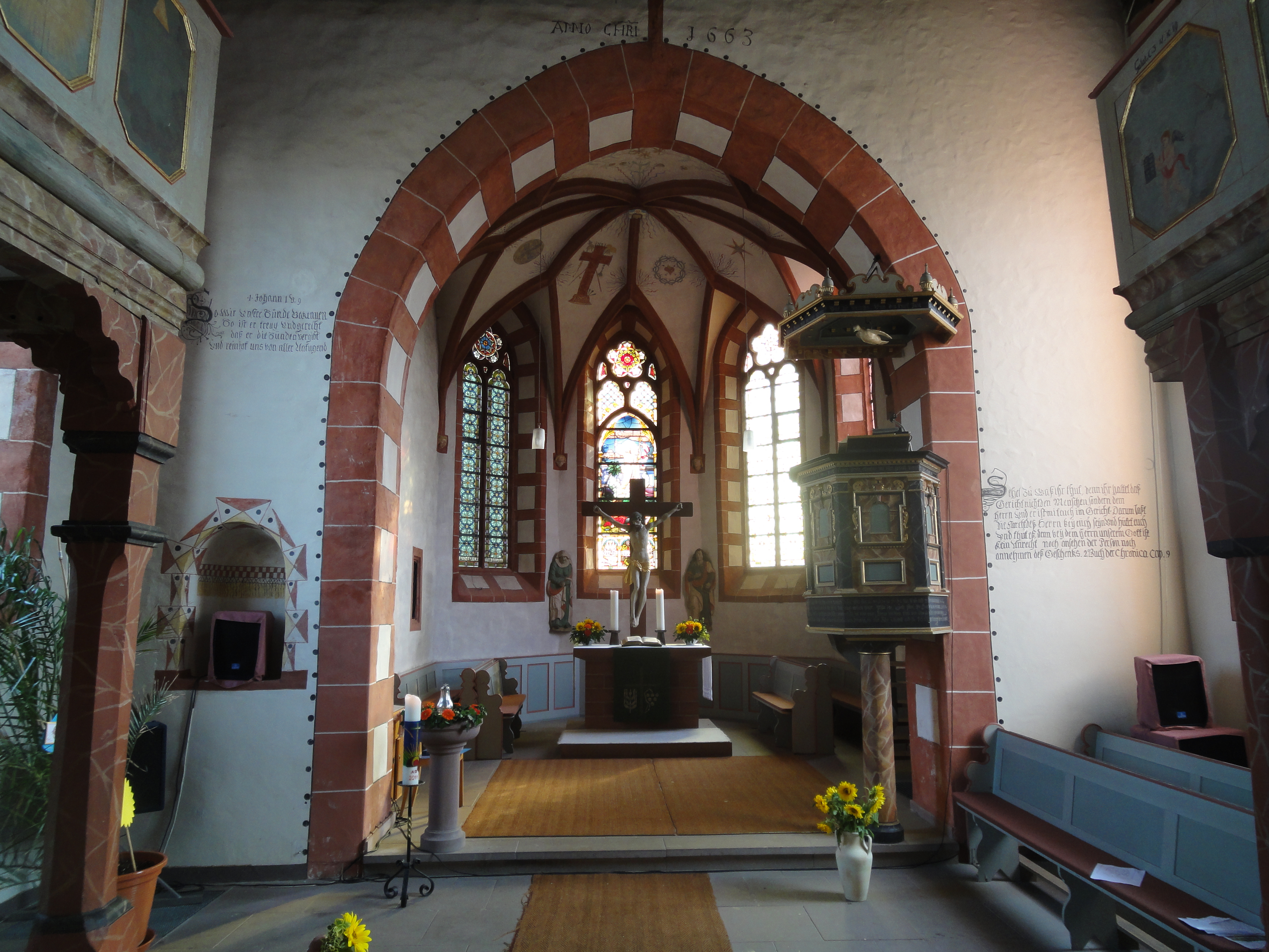 Innenansicht der Kirche in Idstein Walsdorf